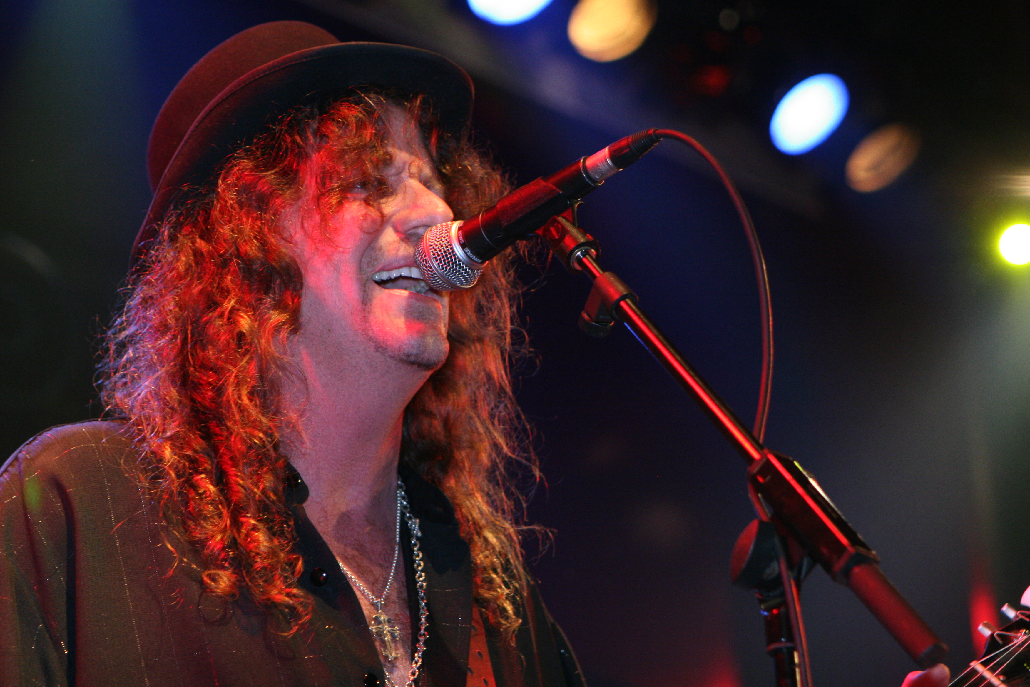 Mike Estes, guitarrista y vocalista de Skinny Molly, en la Sala Apolo de Barcelona el 20 de Abril de 2009.